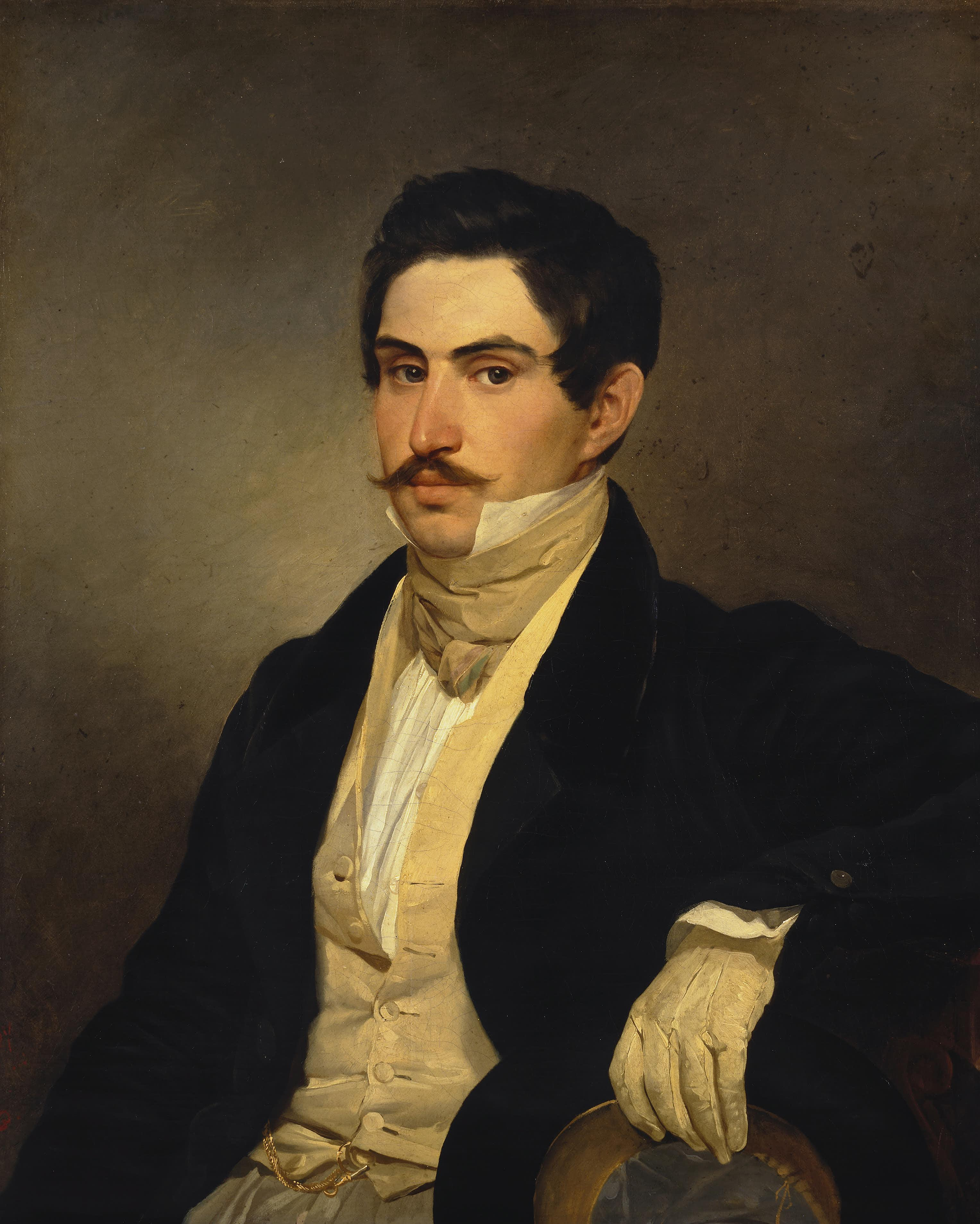 Портрет калужского помещика, бывшего поручика Н.А. Охотникова, брата декабриста К.А. Охотникова. Написан Карлом Брюлловым в Италии в 1827 году, холст, масло.